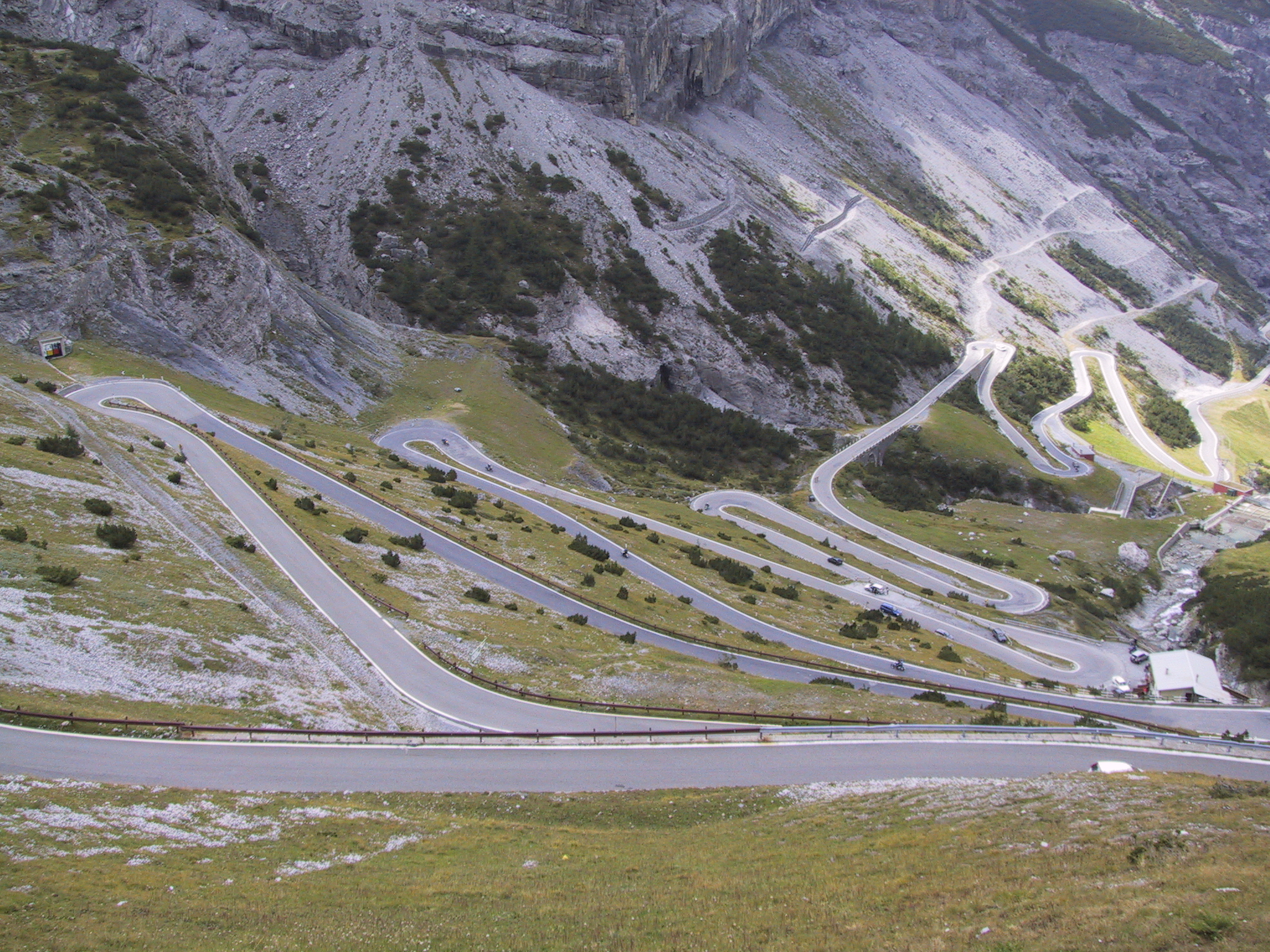 I tornanti del versante atesino del Passo dello Stelvio.